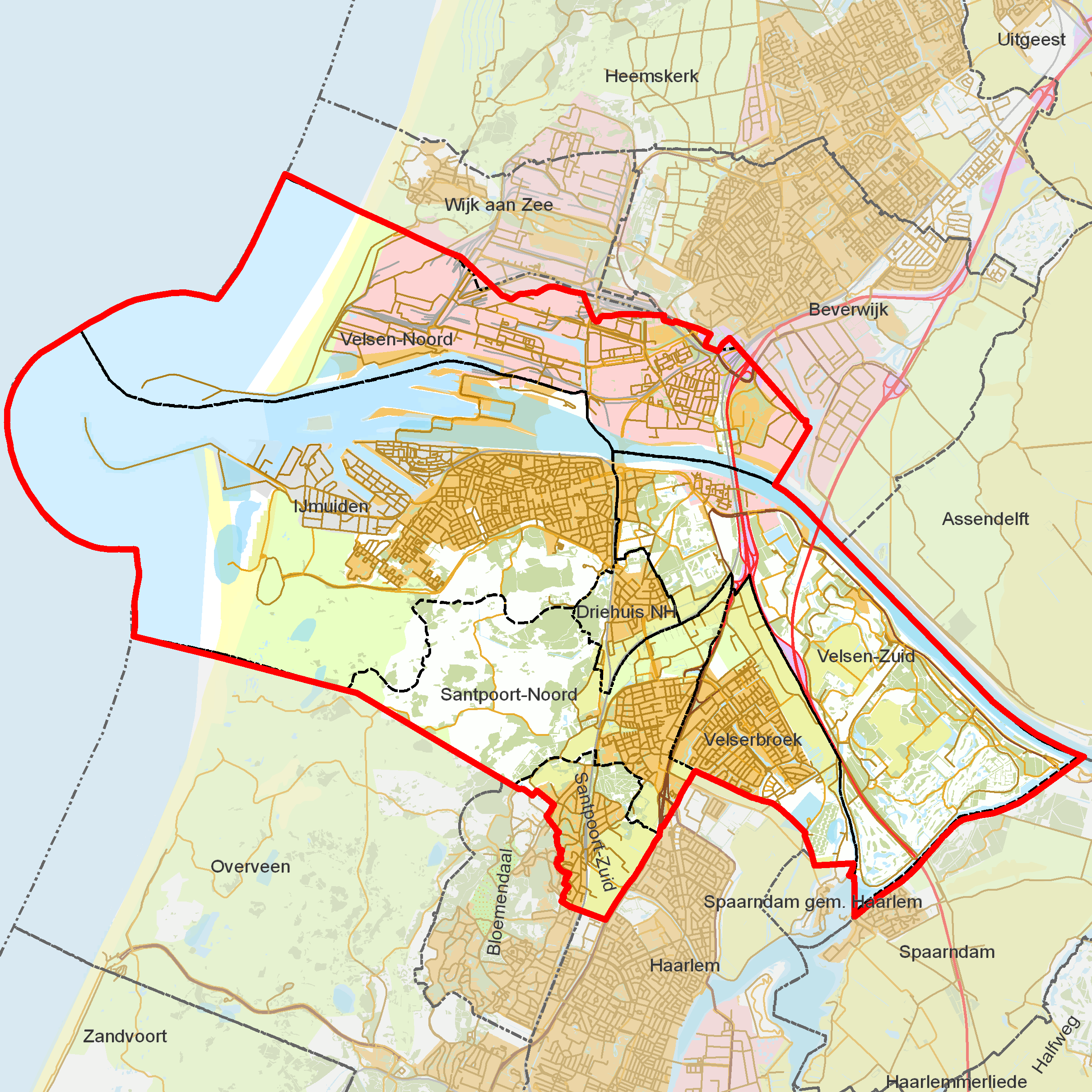 BAG woonplaatsen - Gemeente Velsen.png